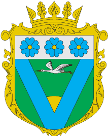 Герб Володимирецького району.